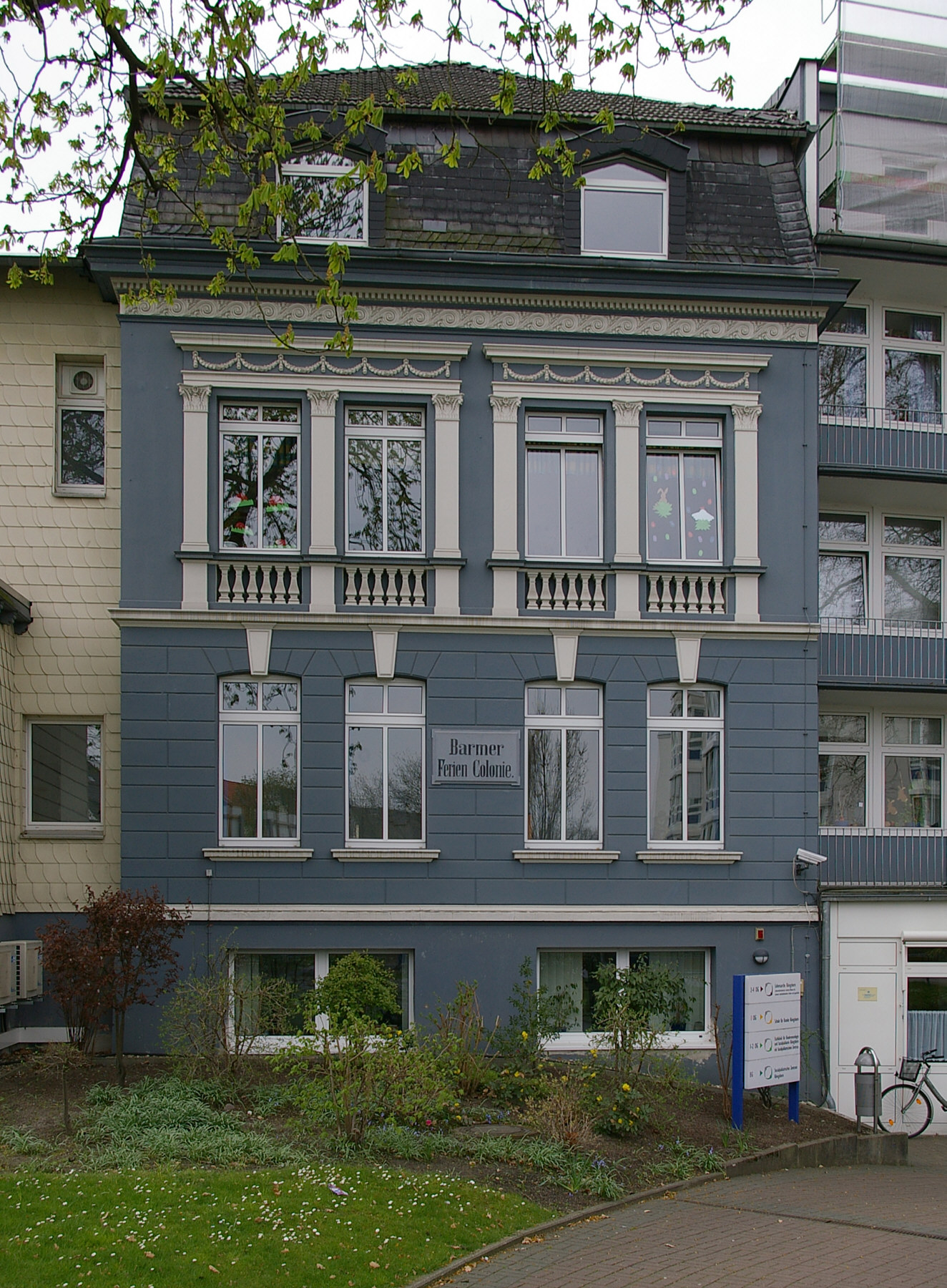 Unna, Lebenszentrum Königsborn, Heil- und Pflegeeinrichtung für Schwer- und Schwerstbehinderte. Keimzelle der Einrichtung war die "Barmer Feriencolonie", Kuranstalt für Kinder.